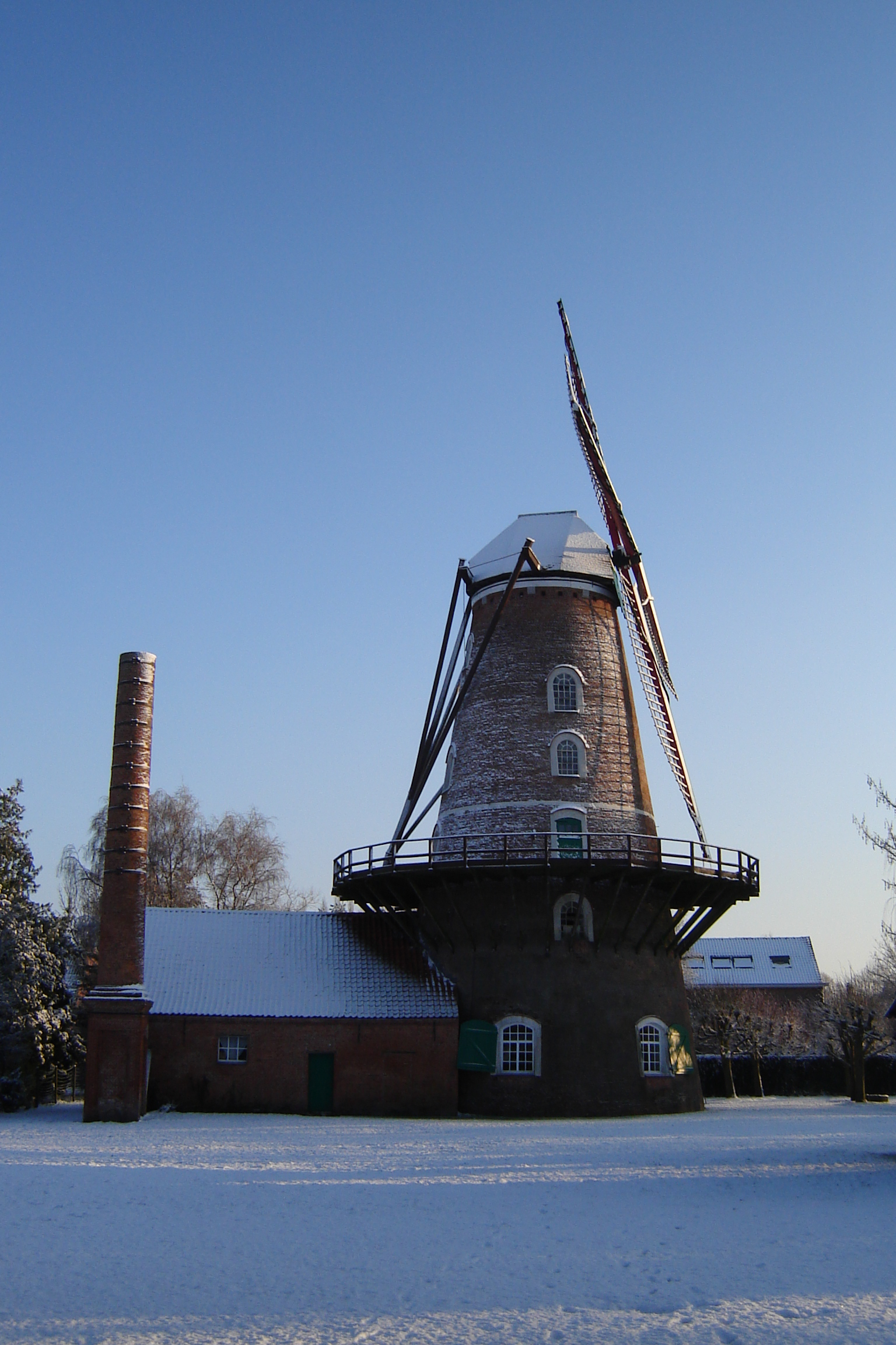 Roomanmolen in de sneeuw. Molen gebouwd in 1847, oorspronkelijk olieslagmolen, naderhand graanmolen. Meer info: Theo Hullebroeck Molenaar